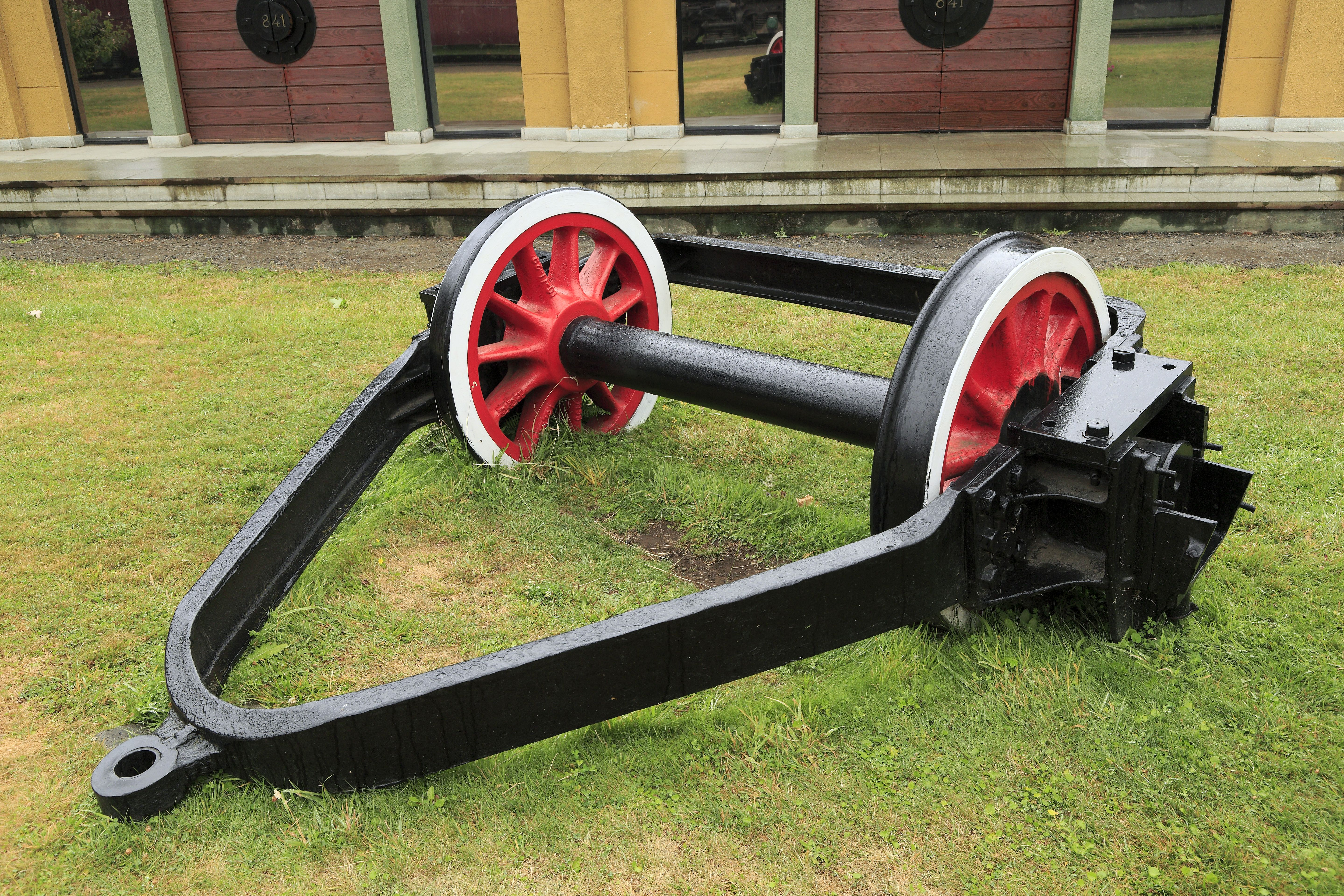 … ausgebaut in Rückenlage, die Bezeichnung «Delta-Schleppgestell« ist von der dreieckigen Rahmenform abgeleitet. Durch diese ist die Anordnung eines Deichselgestells möglich, ohne die Ausbildung des Aschkastens zu behindern.